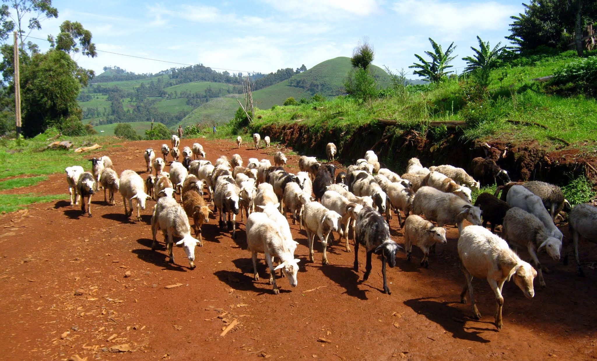 La vie des Bororo à Bangang